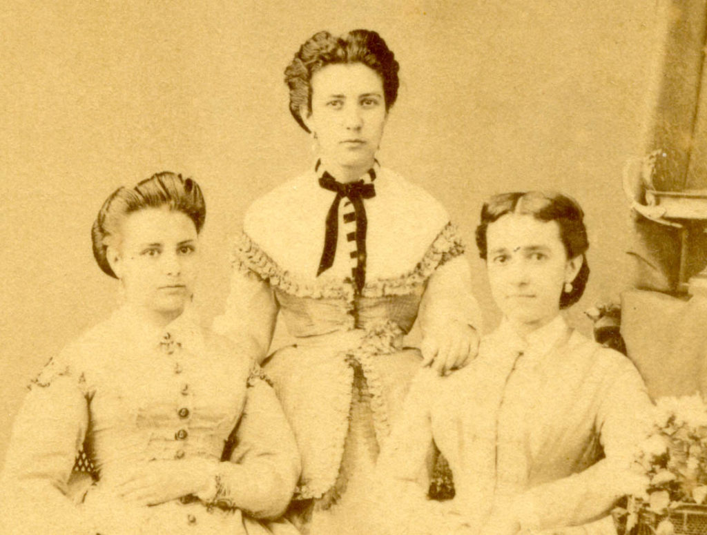 Foto de Eufrásia Teixeira Leite, em pé, sua prima e sua irmã Francisca Bernardina Teixeira Leite.